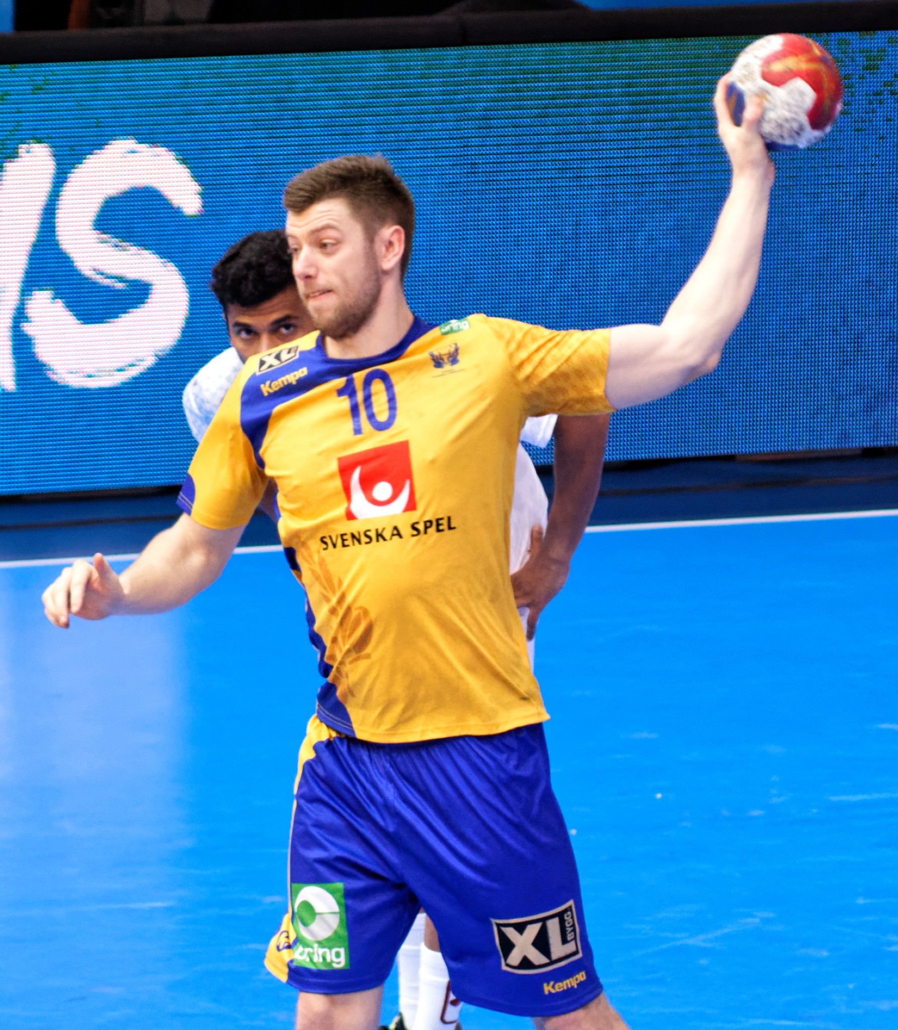 Match de la phase préliminaire du championnat du monde masculin de handball 2017 entre la Suède et le Qatar (Groupe D). A Bercy, le 18 janvier 2017.